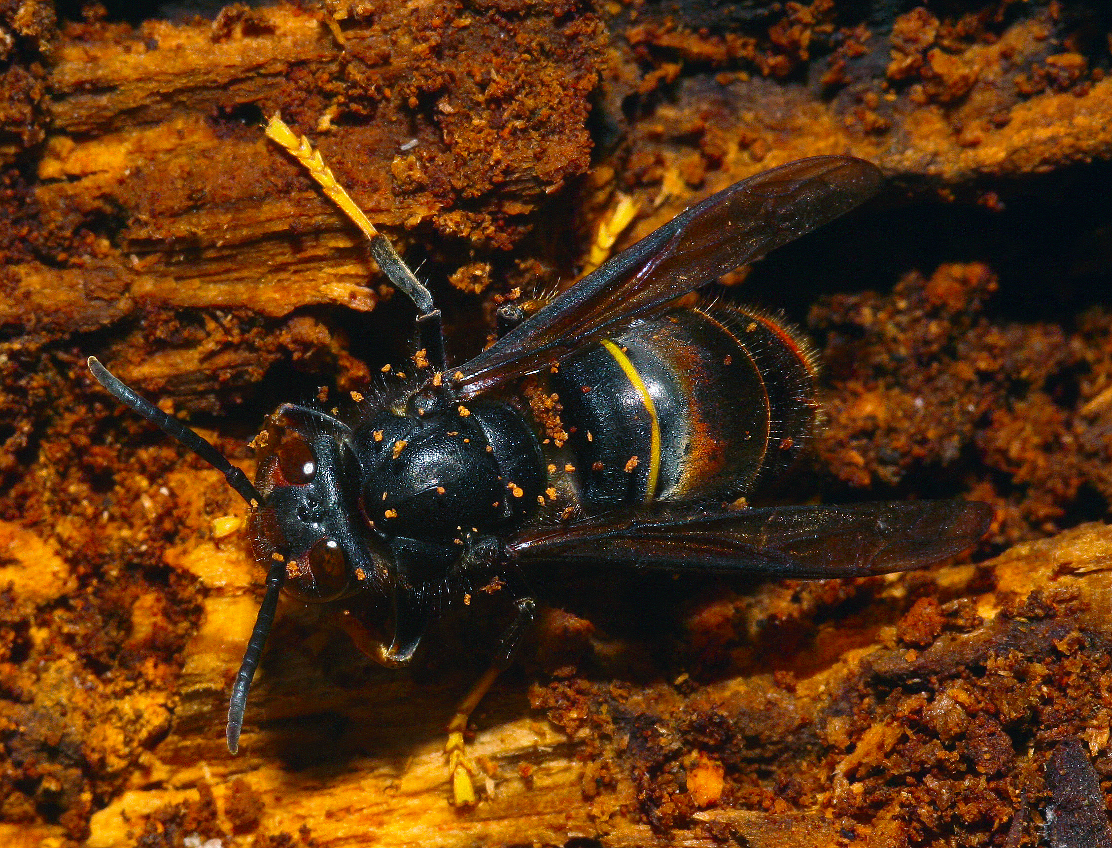 Gros plan vue de de dessus d'un frelon Asiatique